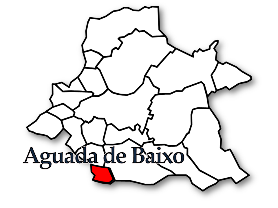 Censos 1864/2011